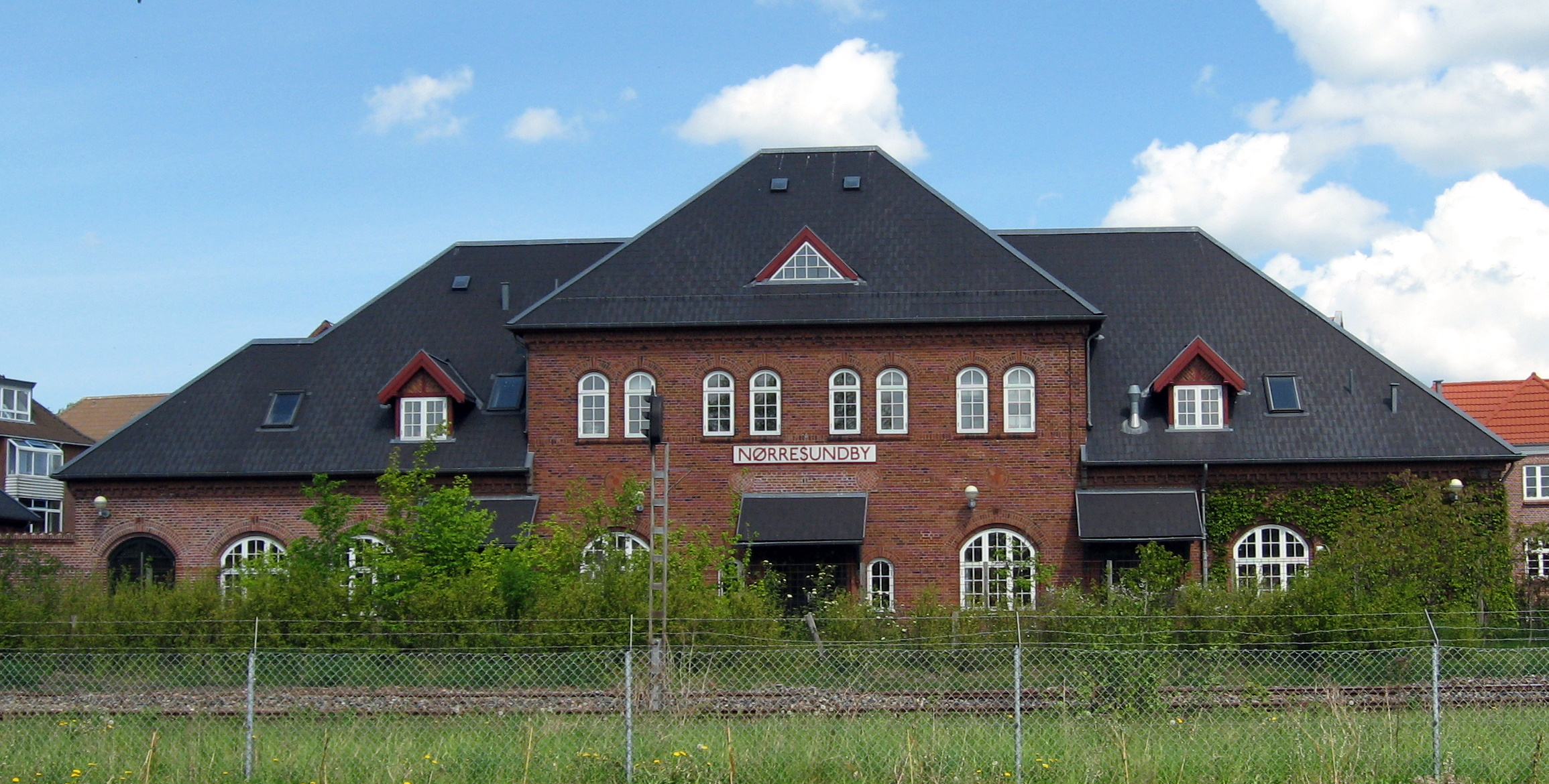 Nørresundby Station